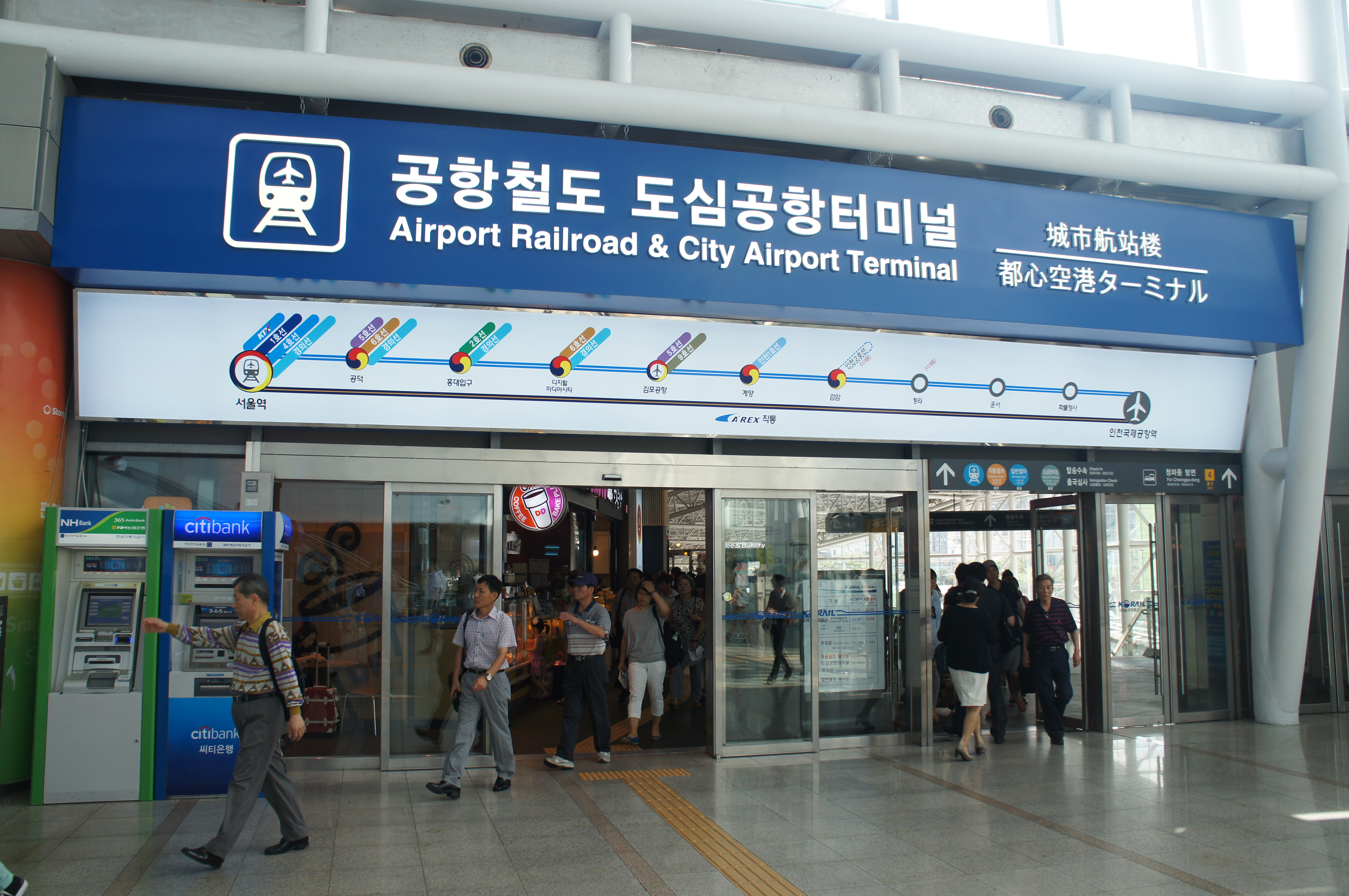 서울역 공항철도 출입구